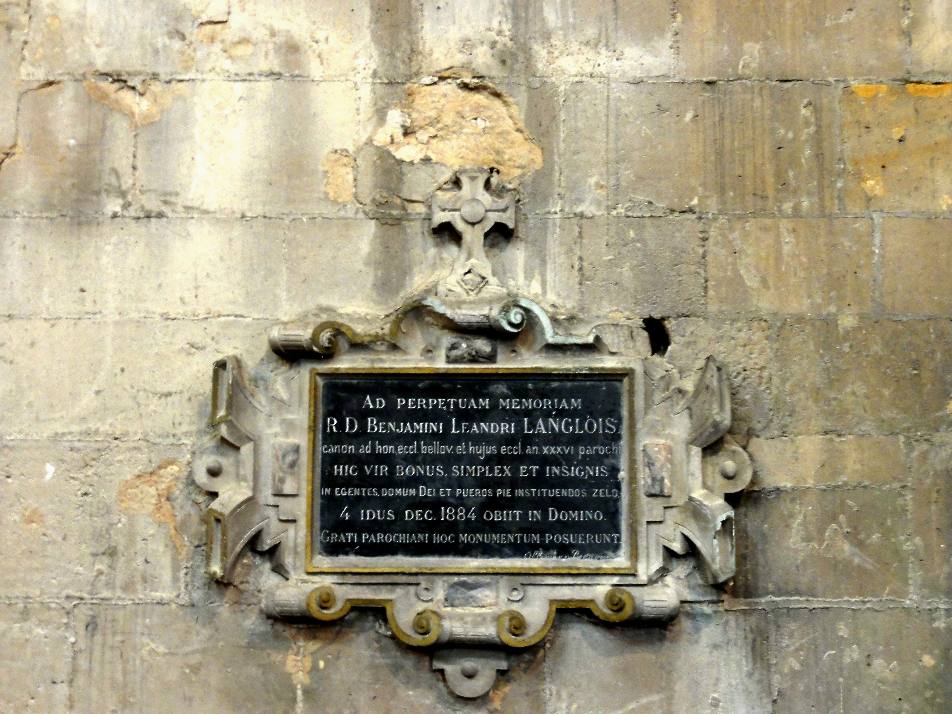 Plaque commémorative pour Benjamin Langlois, curé de la paroisse entre 1848 et 1884.